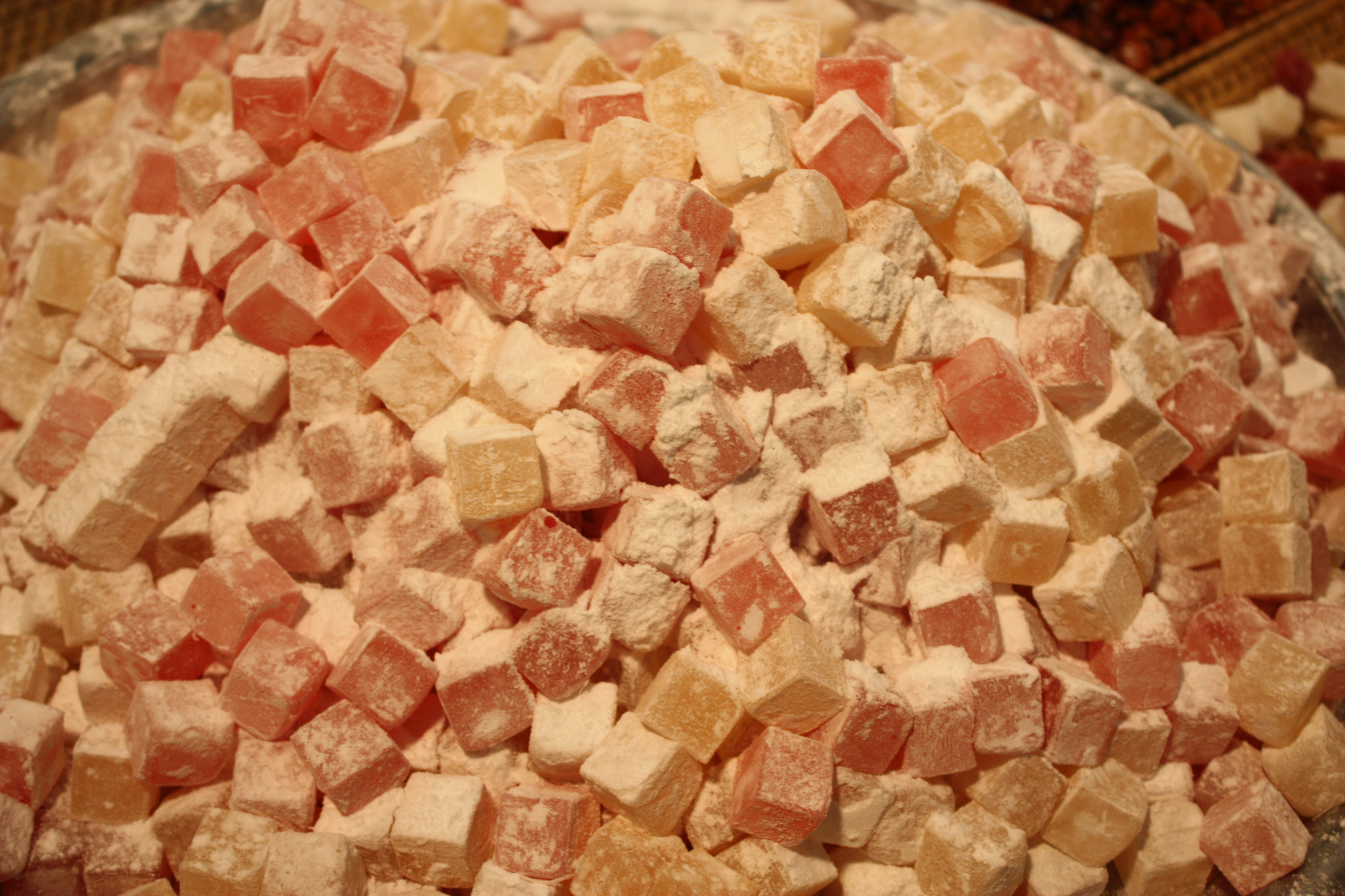 Lokum